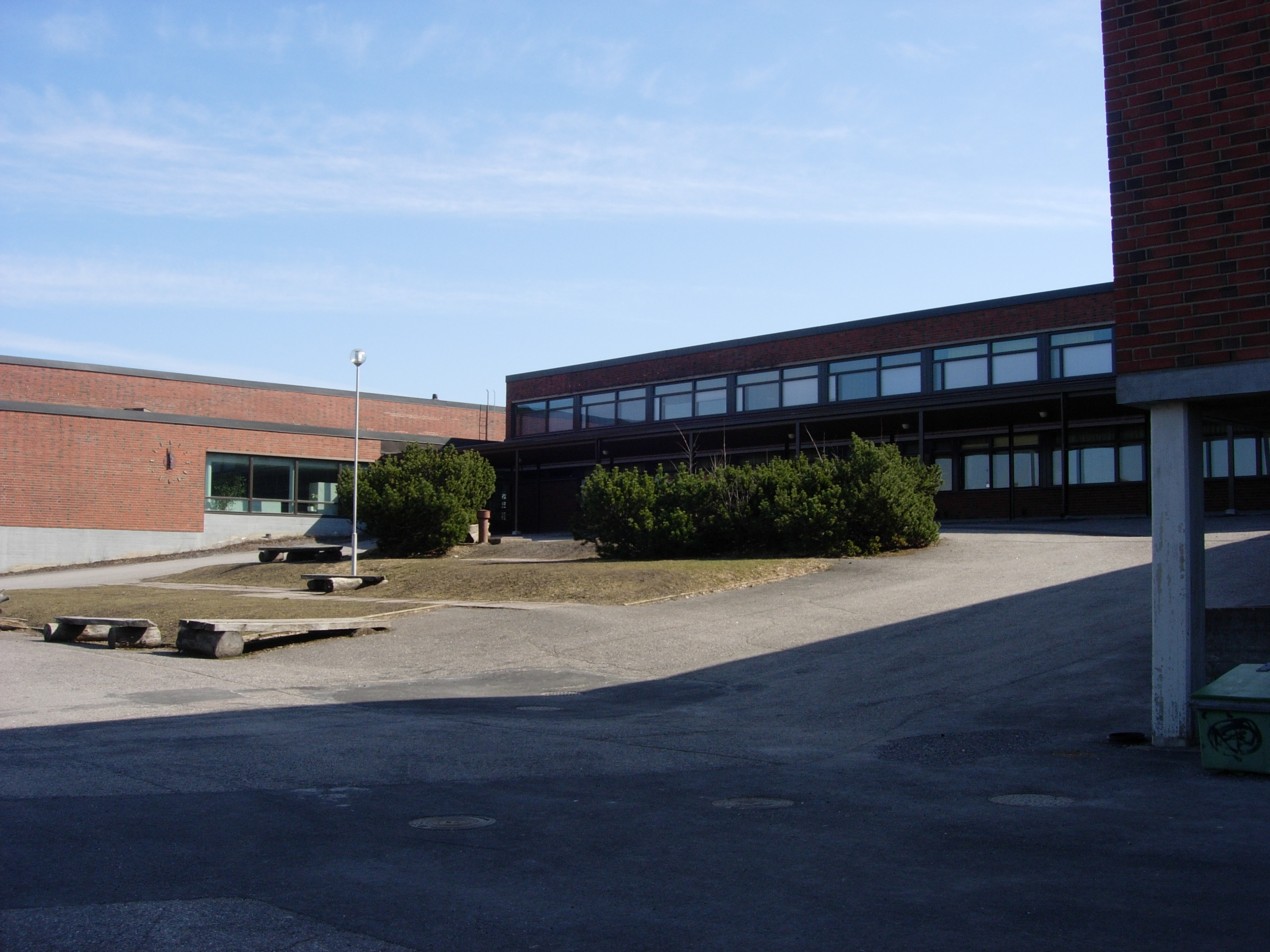 Kastun koulu ja lukio, Turku. Entinen Raunistulan yhteislyseo. Arkkitehdit Olavi Reima ja Kauko Reima, valmistunut 1970. Purettu 2016, tilalle päiväkoti.